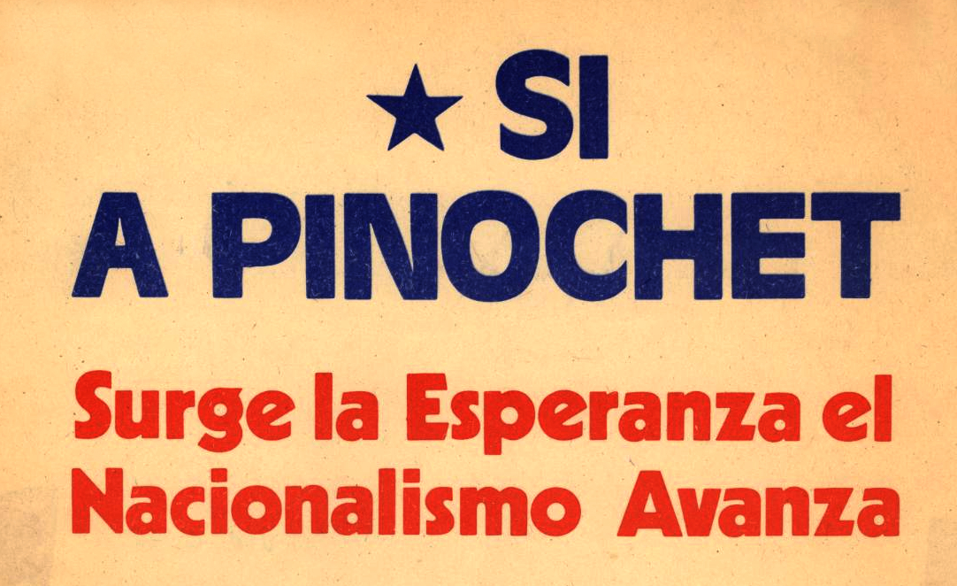 "Sí a Pinochet. Surge la Esperanza el Nacionalismo Avanza". Panfleto publicado para el plebiscito constitucional de 1980.